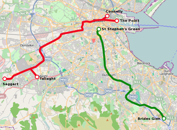 Plan d'ensemble du réseau Luas (Tramway de Dublin)